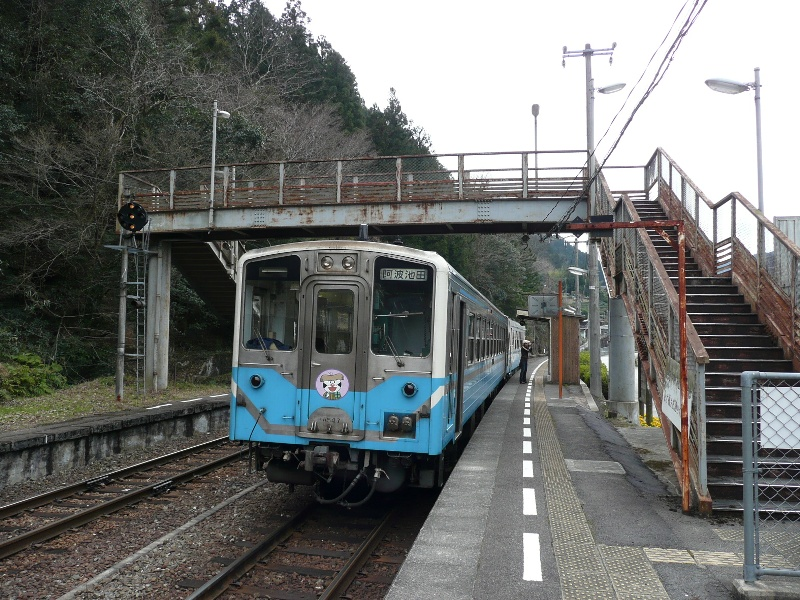 Tosa-Iwahara station